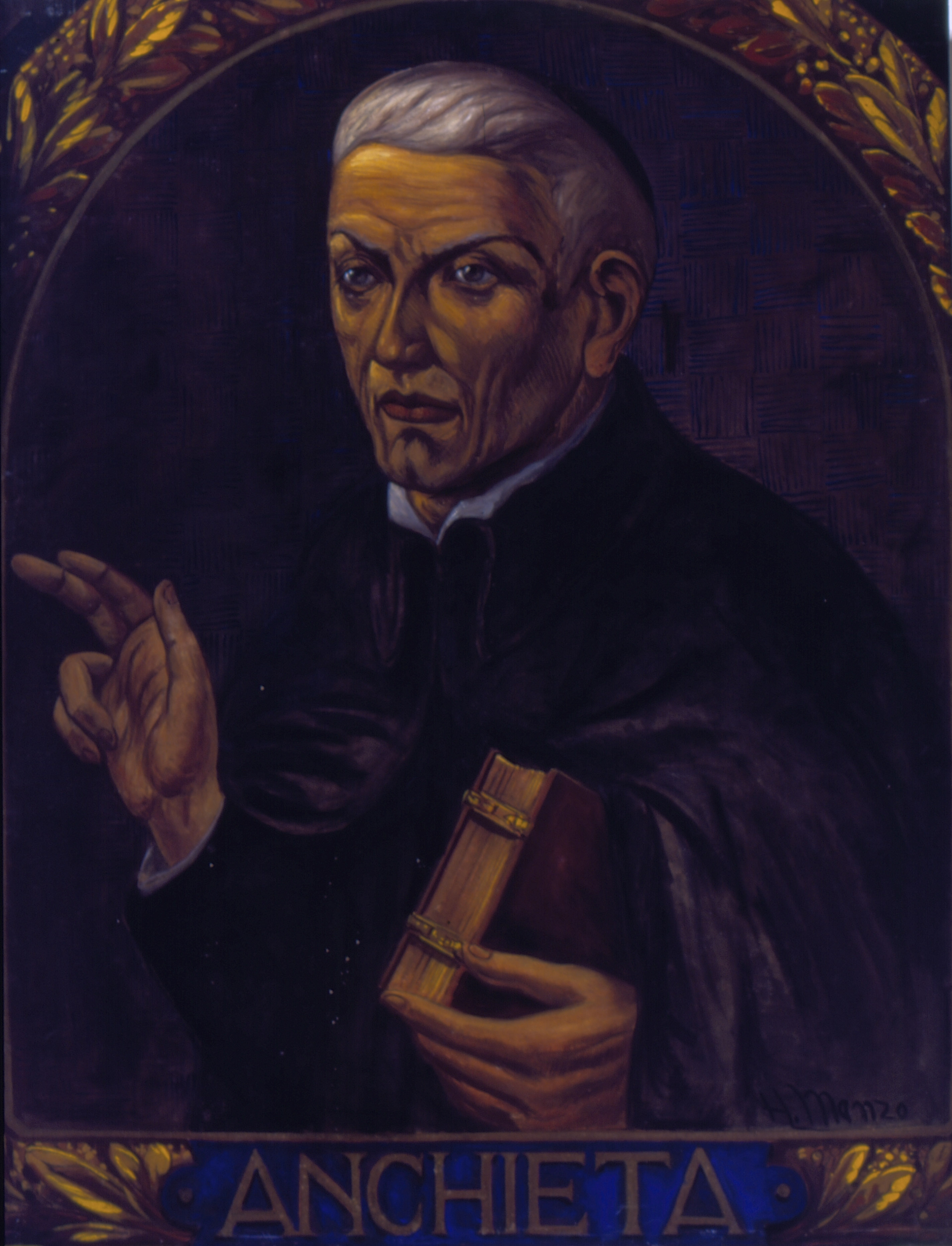 Obra que integra o acervo do Museu Paulista da USP. Coleção Fundo Museu Paulista - FMP